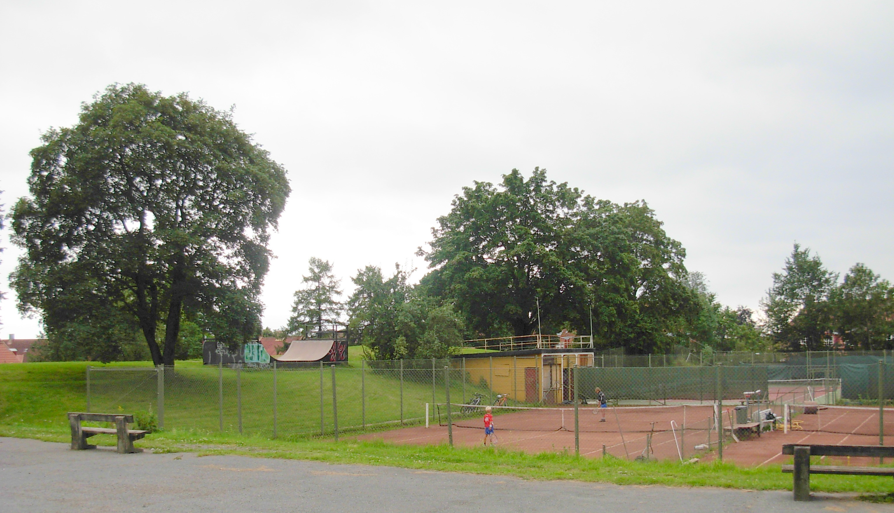 Harald Hals' park, sette fra det nordvestlige hjørnet